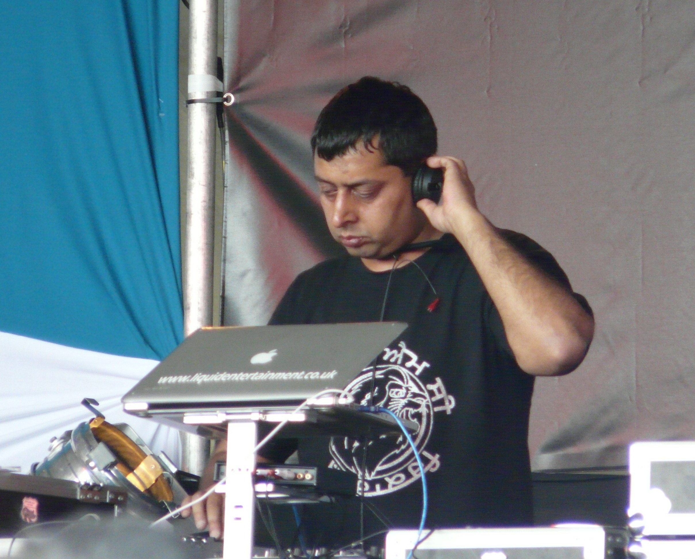 Panjabi MC performing at London Mela in 2010